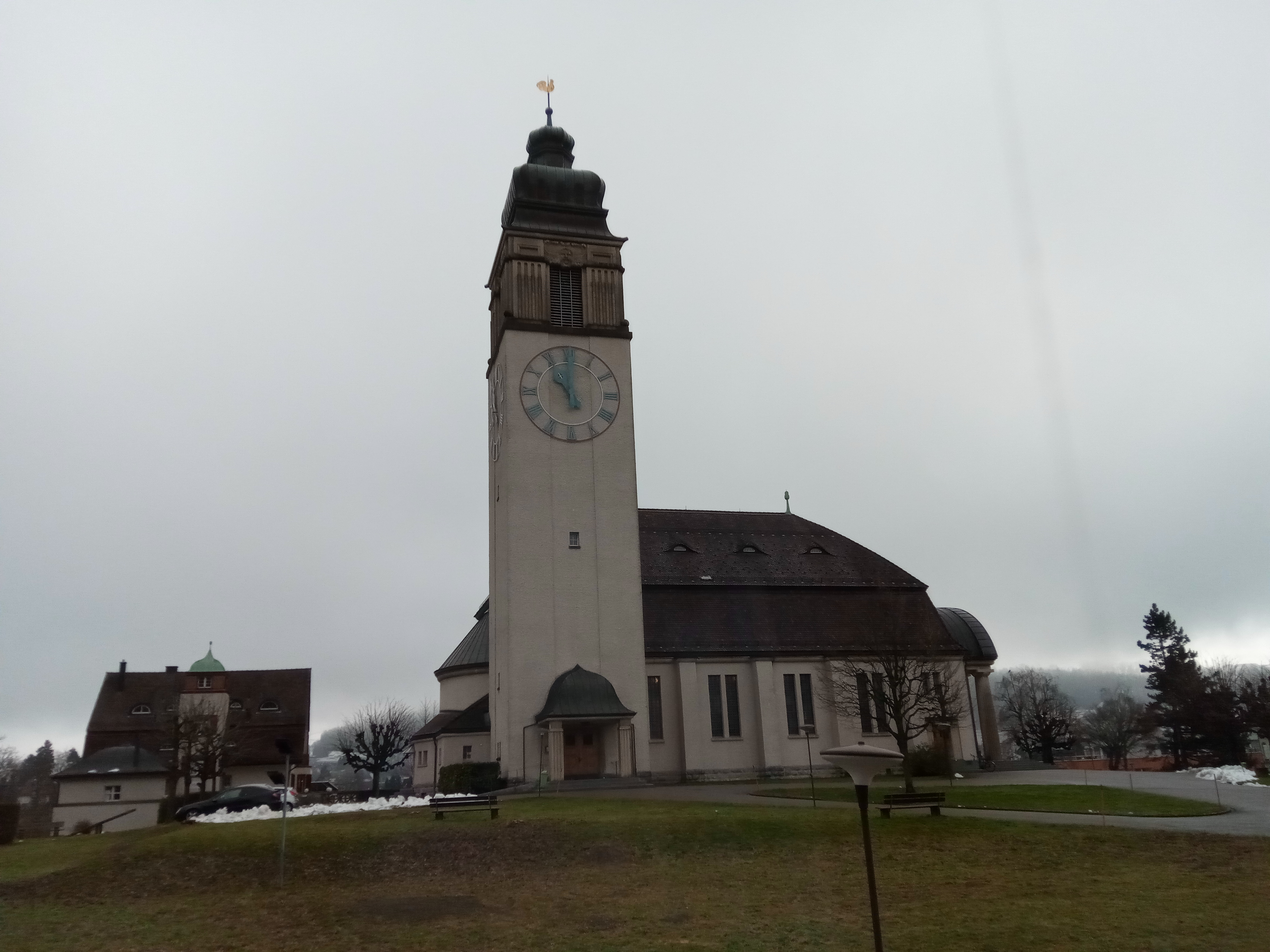 Die Evangelische Kirche im St. Galler Heiligkreuzquartier von Norden gesehen